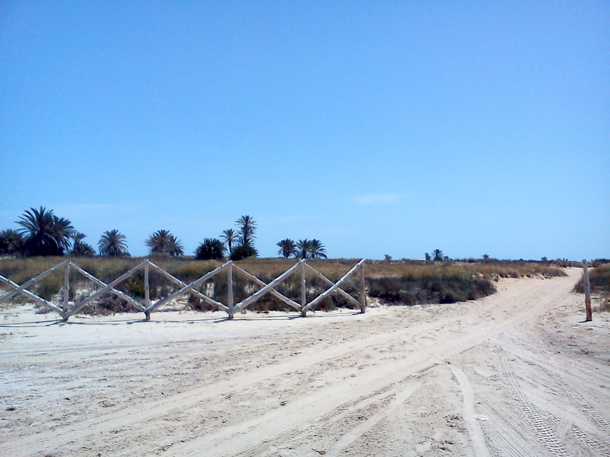 Clôtures de protection des dunes et de la flore. Bin Bahrin, Djerba